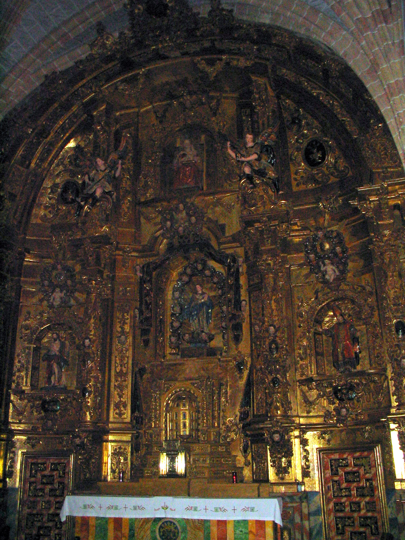 Retablo de la capilla mayor, de la iglesia de Nuestra Señora del Castillo, Macotera. Con las imágenes de la patrona de la iglesia, San Juan, Inmaculada Concepción y San Ildefonso.